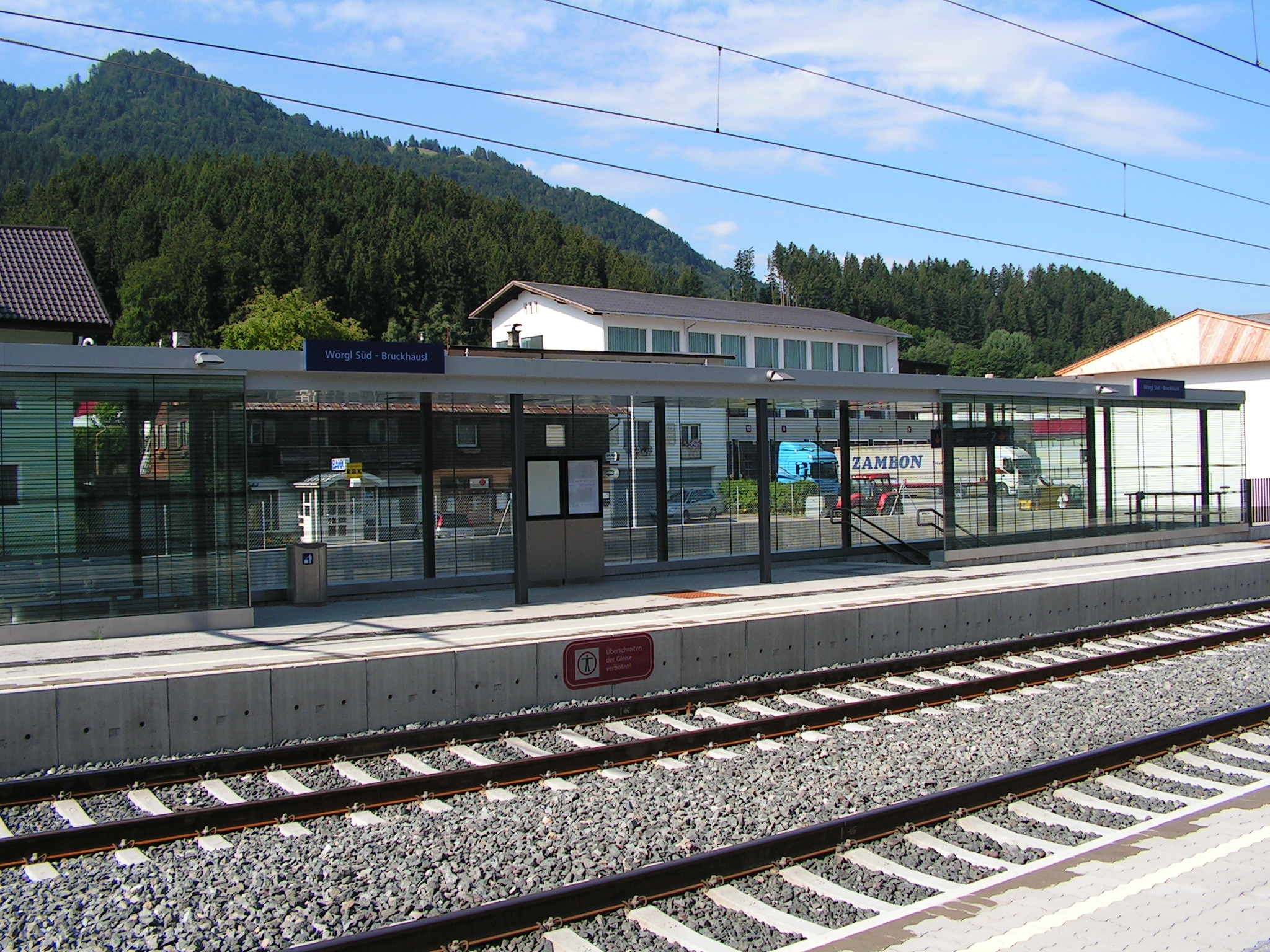 Woergl Suedbahnhof (HSt Wörgl Süd - Bruckhäusl)